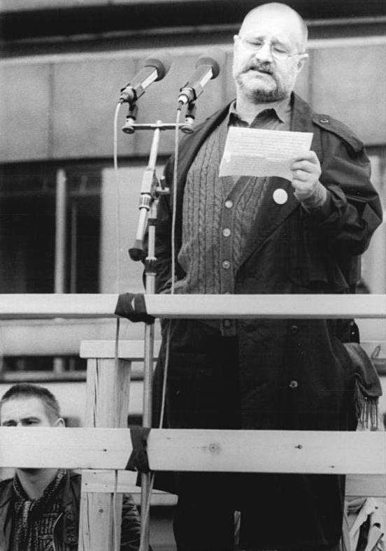 ADN-ZB Link 4.11.89 Berlin: Demonstration 500.000 Bürger beteiligten sich an einer Demonstration für den Inhalt der Artikel 27 und 28 der Verfassung der DDR. Auf dem anschließenden Meeting auf dem Alexanderplatz ergriff auch der Schauspieler Ekkehard Schall das Wort.